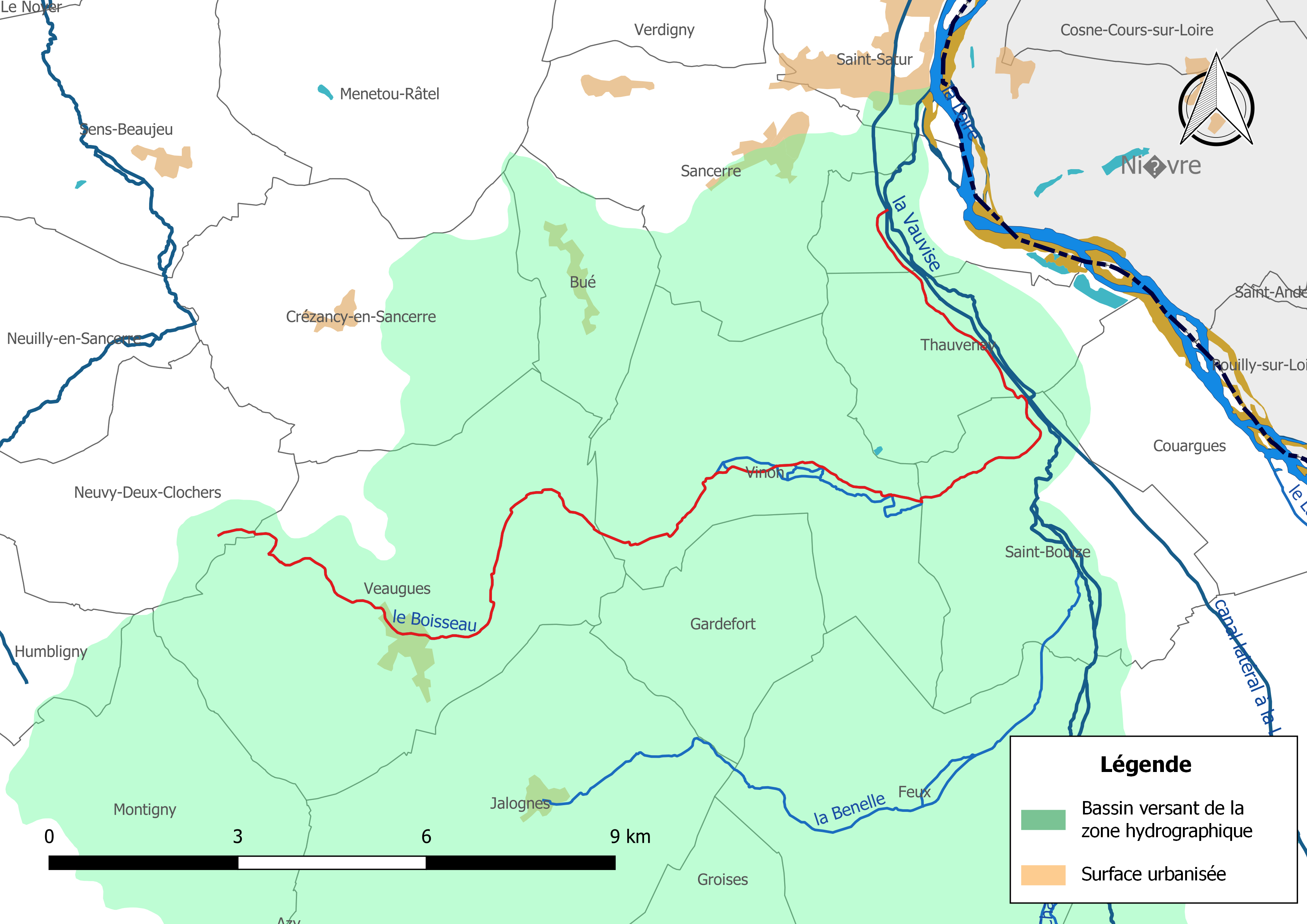 Carte du cours d'eau « le Boisseau » (France) et de la zone hydrographique dans laquelle il s'insère.